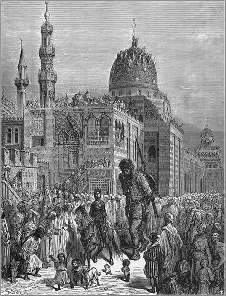 Astolfo y Caligorante.